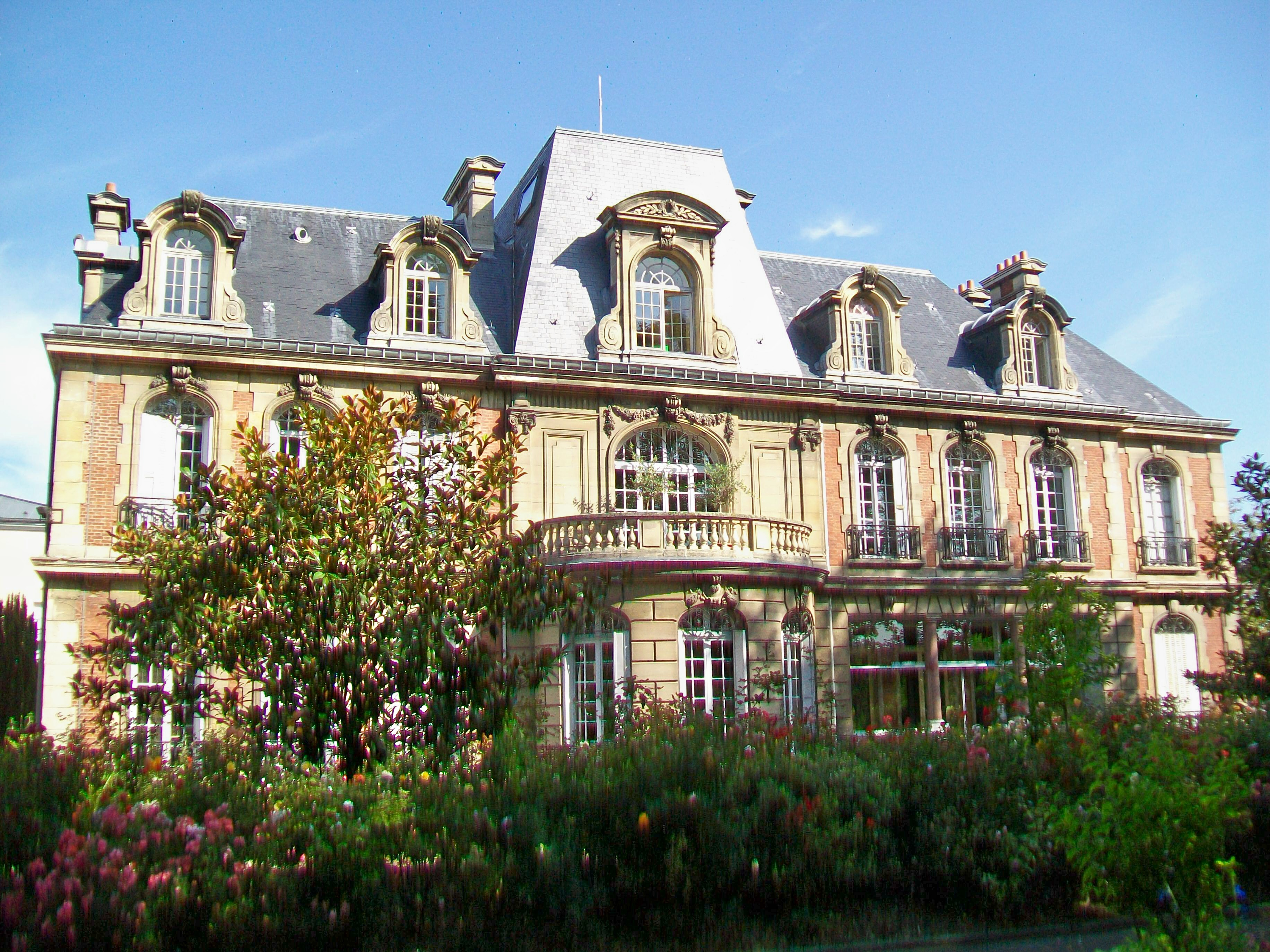 Hôtel de ville, 64 rue de Paris ; façade sud sur le parc.